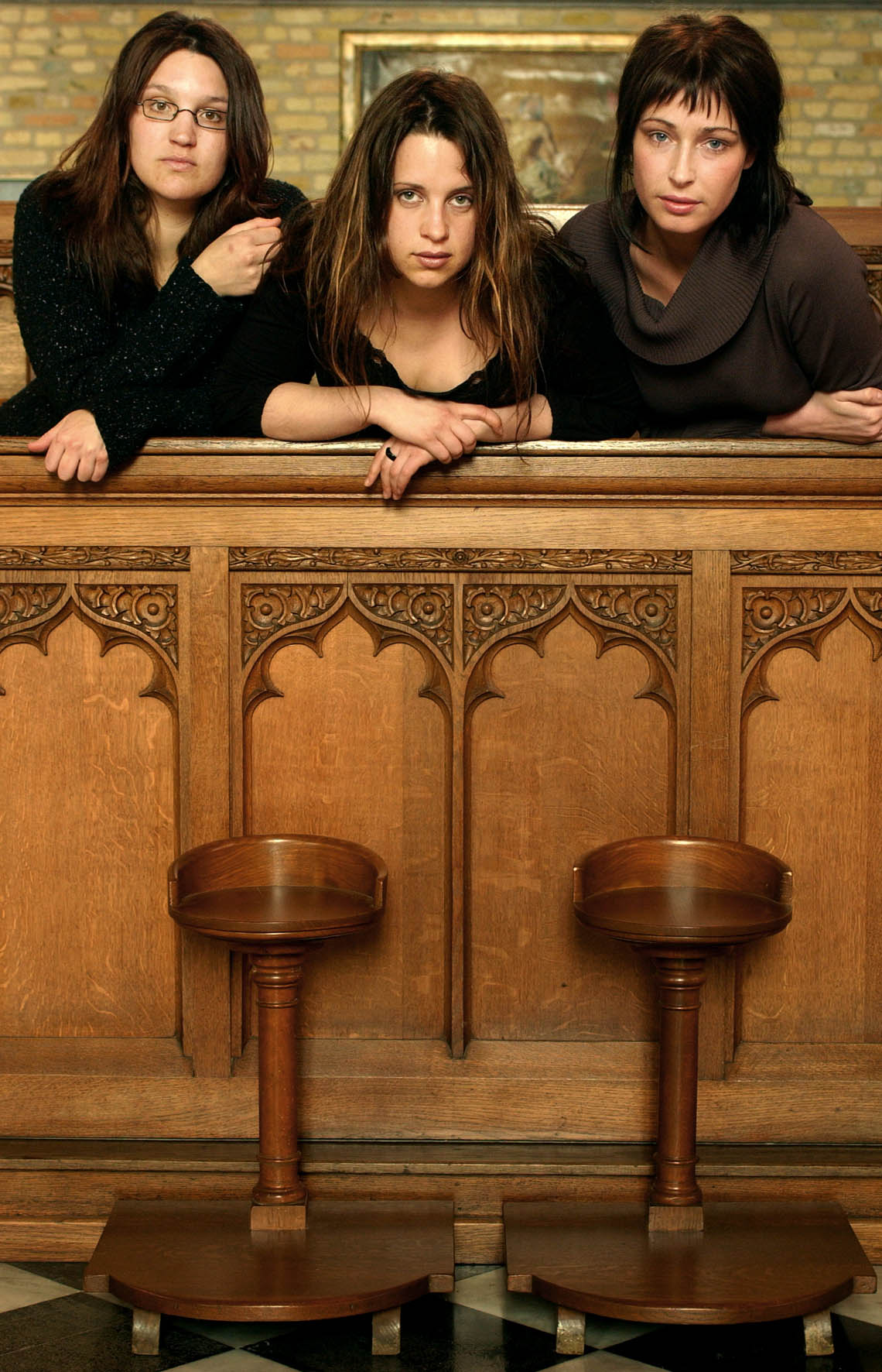 Laïs, Belgisch folktrio